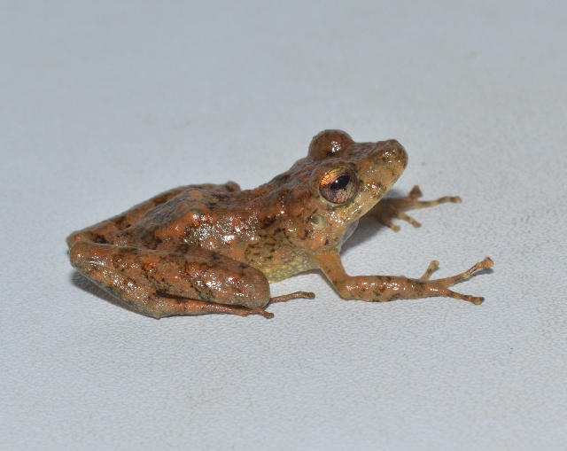 Pristimantis fallax